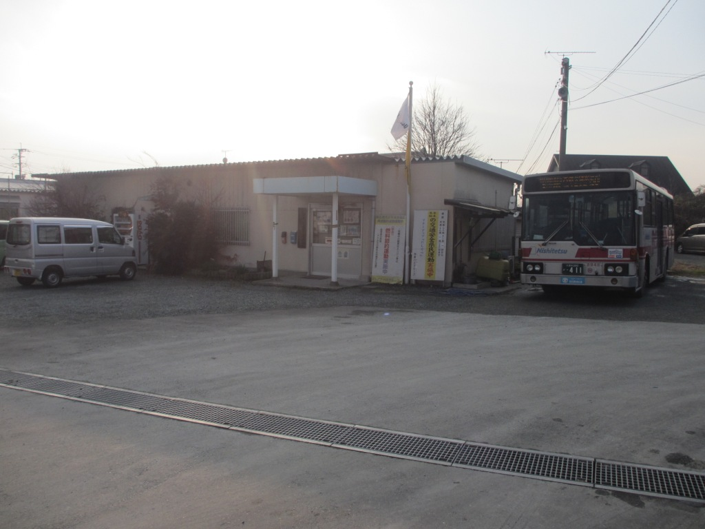 西鉄バス久留米 筑後車庫（西日本鉄道筑後第2自動車営業所）